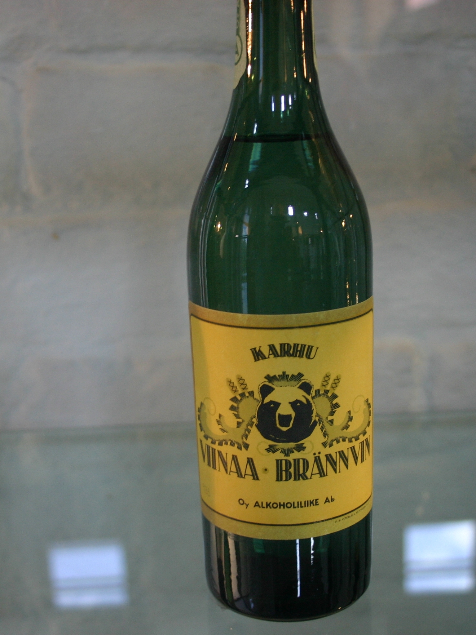 Alkuperäinen Karhuviinapullo